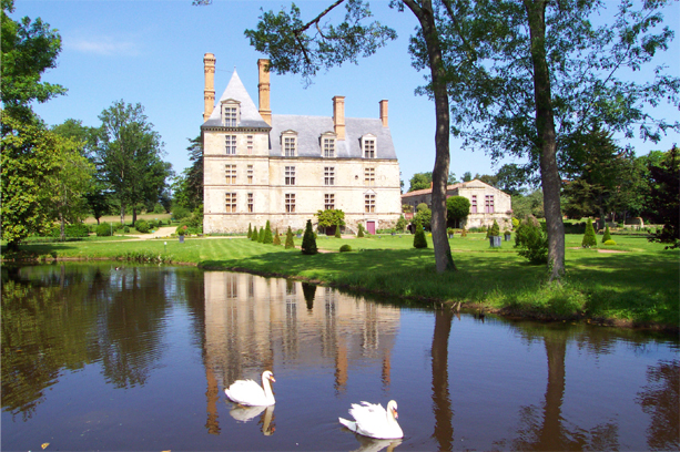 Vue principale de château des aventuriers